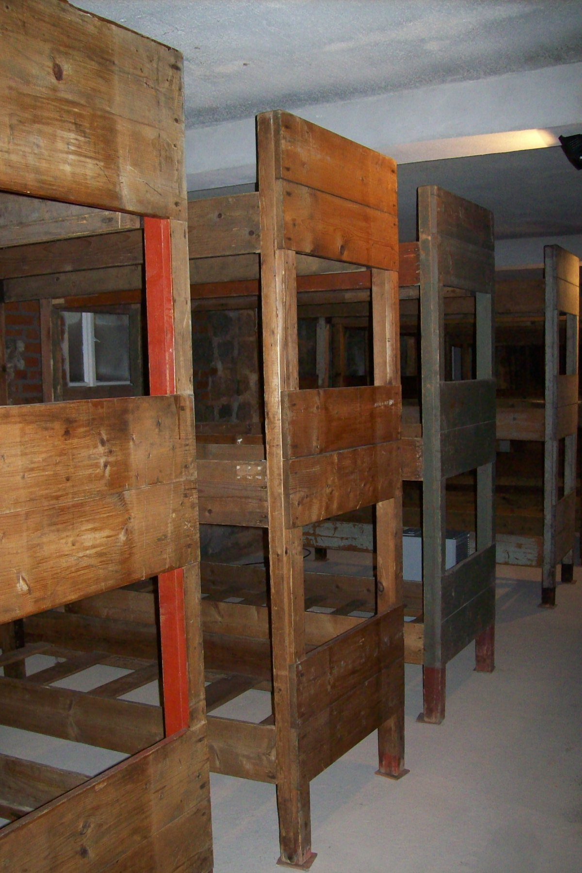 W takich warunkach spali więźniowie, po kilka osób na łóżku